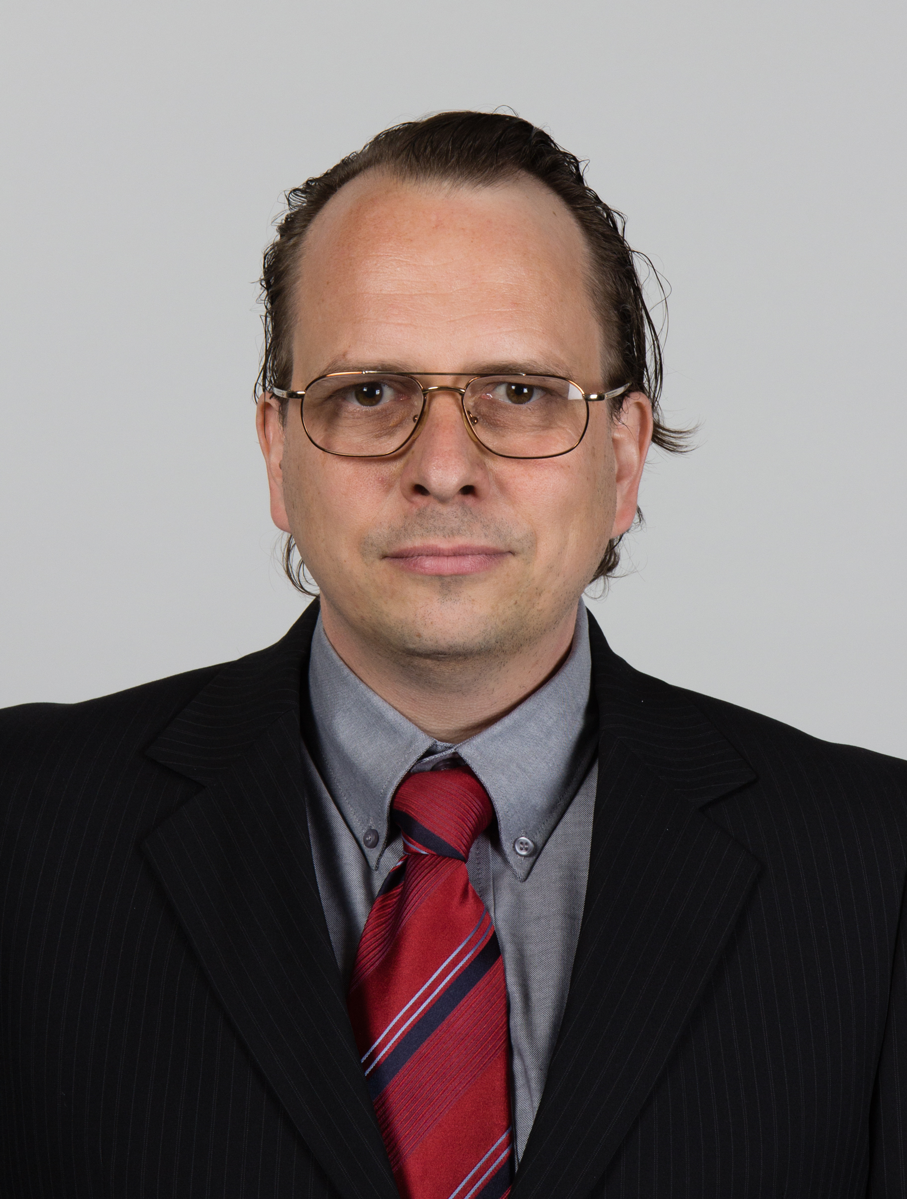 Jakob Maria Mierscheid * 1. März 1933 in Morbach, Rheinland-Pfalz) ist ein fiktiver deutscher Politiker (SPD), der seit 1979 Mitglied des Deutschen Bundestages sein soll. Die abgebildete Person wurde dem Fotografen gegenüber von der stellvertretenden Fraktionsvorsitzenden identifiziert. Wikipedia-Bundestagsprojekt 2014 8–12 September 2014 in BerlinThis file was taken during the project “Wiki loves parliaments/Bundestag 2014” (German). Organisation: Martin Rulsch, Olaf KosinskyDesign: Martin KraftPhotography: Foto-AG Gymnasium Melle (Jan-Kristof Blömke, Lukas Eismann, Moritz Kosinsky, Laura Lessing, Karsten Mosebach, Mascha Mosebach, Teresa Schreer, Noah Sewöster, Niklas Tschöpe), Olaf Kosinsky, Martin Kraft, Harald Krichel, Steffen Prößdorf, Ralf Roletschek, Martin Rulsch, Gerd Seidel, Sven TeschkeVideo: Marc Rudnick, Manuel SchneiderEditors: Marcus Cyron, Günter Fremuth, Martin Kraft, Robin Krahl, Harald Krichel, Martin Rulsch, WikiAnikaReception: DasMonstaaa, Leonie Rabea Große, Lutheraner, Nina Möllering, Martin Rulsch, WikiAnika, Foto-AG Gymnasium MelleCosmetics: Regina Bosak, Bettina Dieguez, Sandra Kobbe, Andrea Strehlke; Irada Abdullayeva, Vivien Abelmann, Olena Engelbrecht, Sarah Fabini, Nina Magnus, Jacqueline Schmidt, Leonie Taboada, Julia Willer Usage information If you need more information how to use this file, please send an email to . Personality rights warningAlthough this work is freely licensed or in the public domain, the person(s) shown may have rights that legally restrict certain re-uses unless those depicted consent to such uses. In these cases, a model release or other evidence of consent could protect you from infringement claims.